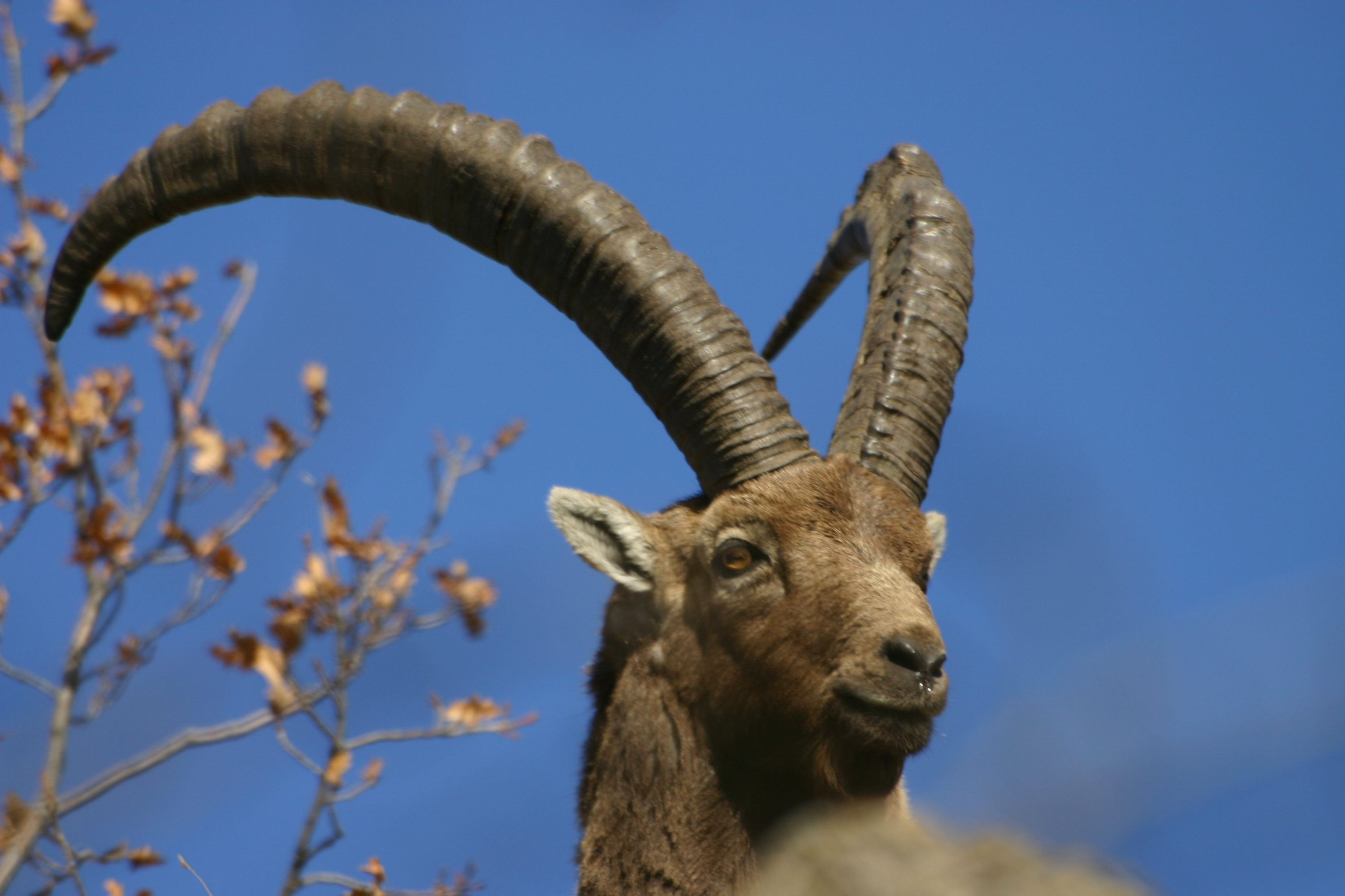 Bouquetin à Saint Julien Montdenis